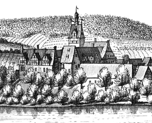 Grohnde